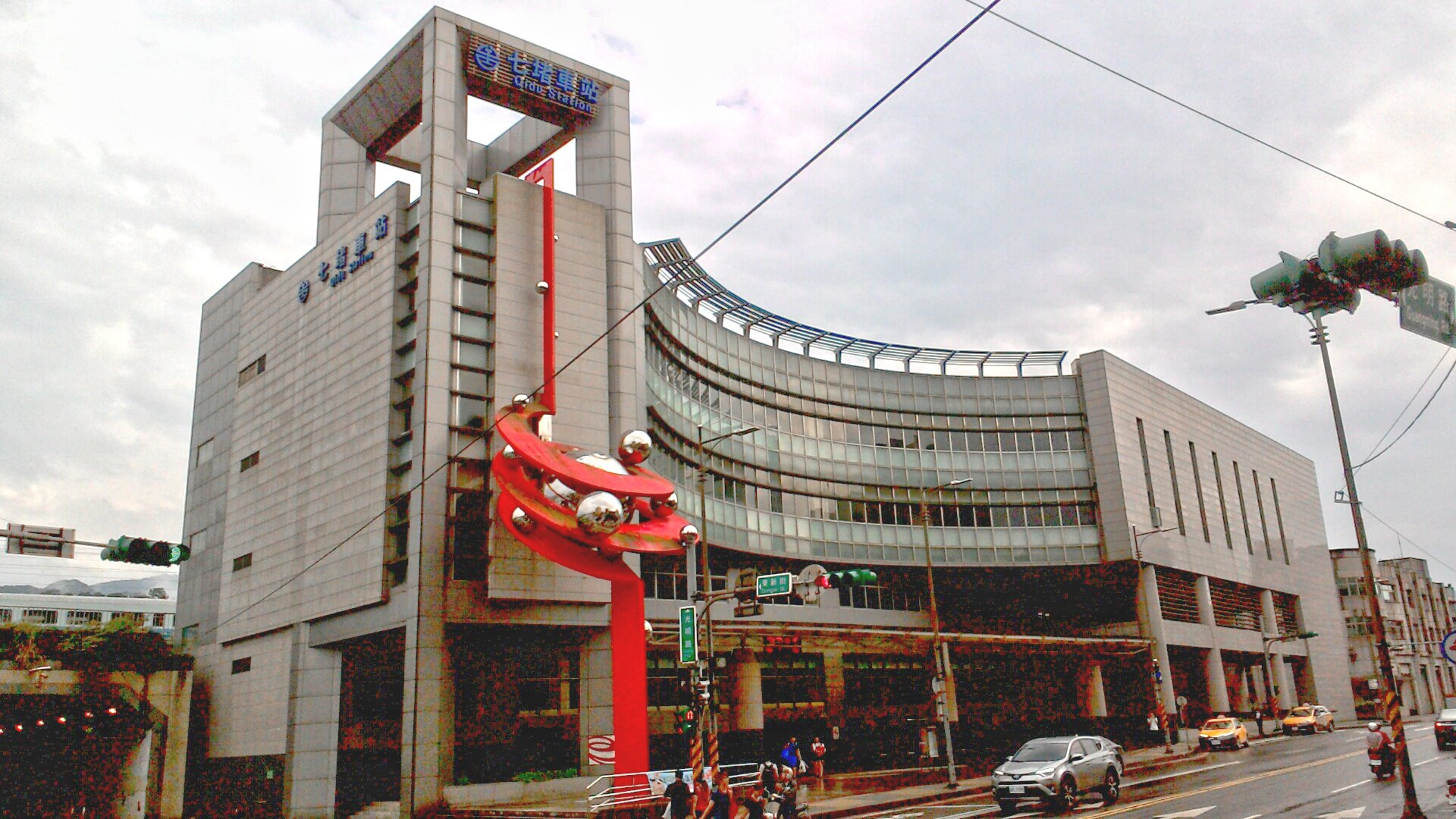 台鐵七堵車站站房西側,基隆市七堵區長興里